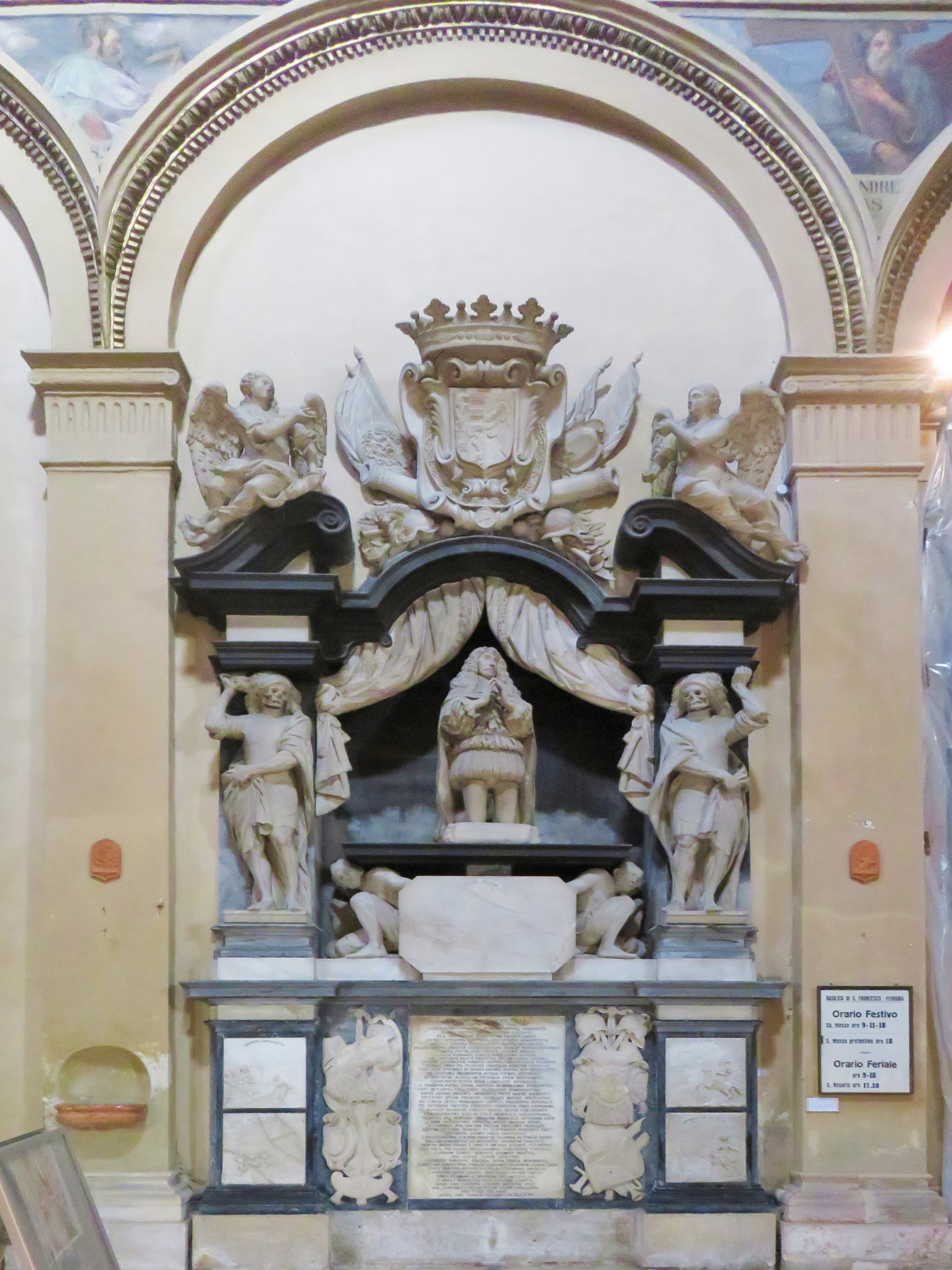 visione d'insieme